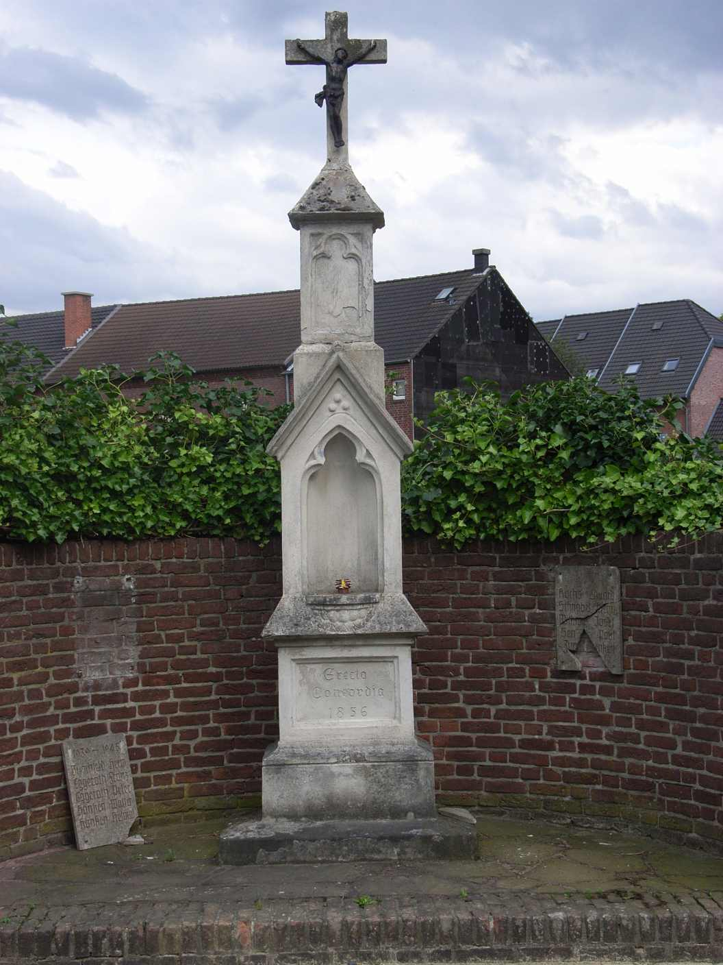 Kreuz von 1856 mit beschädigten Ehrenmaltafeln am Buscherhof, Erkelenz